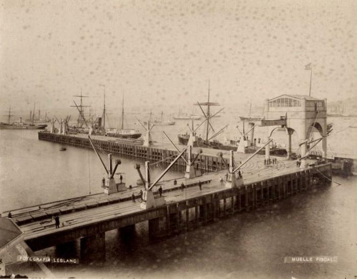 Muelle Fiscal de Valparaíso en 1888, Fotografías de Felix Leblanc.